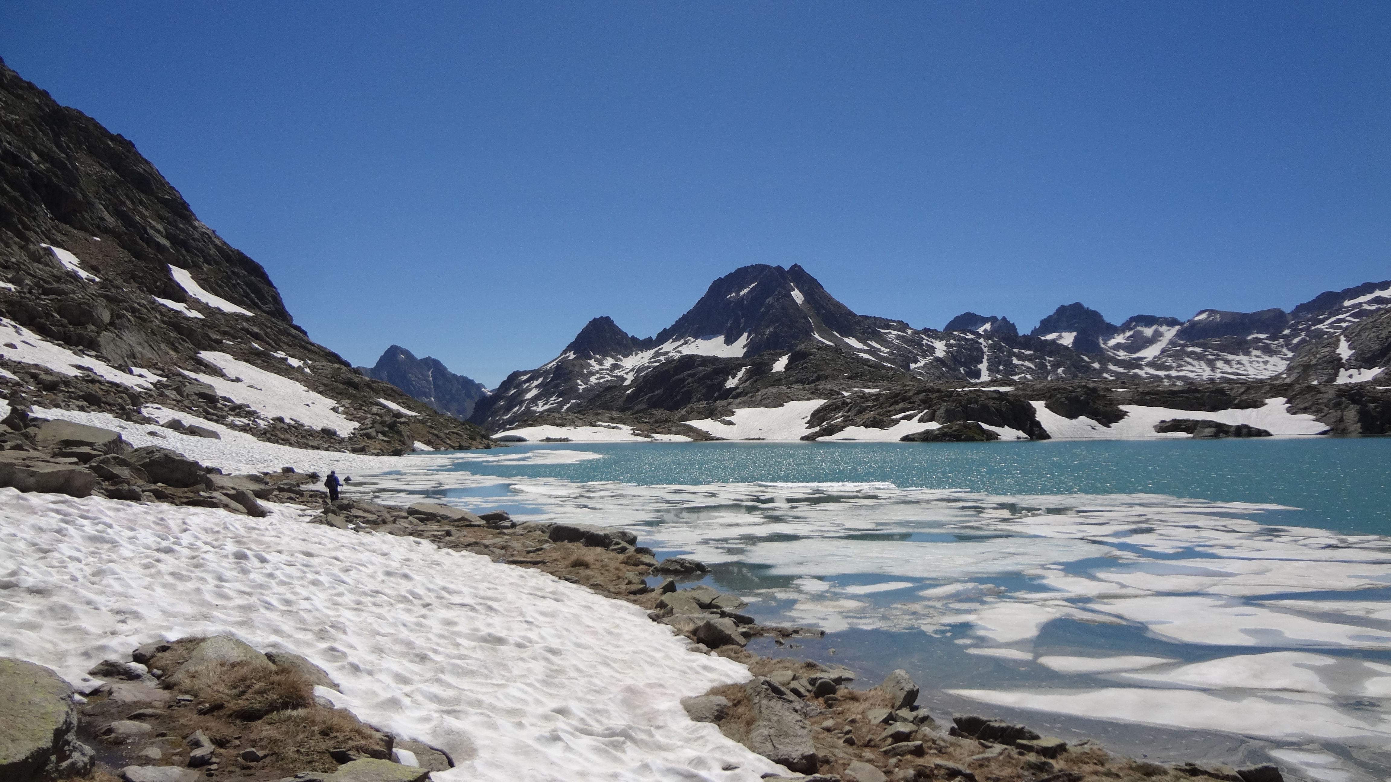 Parc de Naut Aran This is a a photo of a natural area in Catalonia, Spain, with id: ES510146